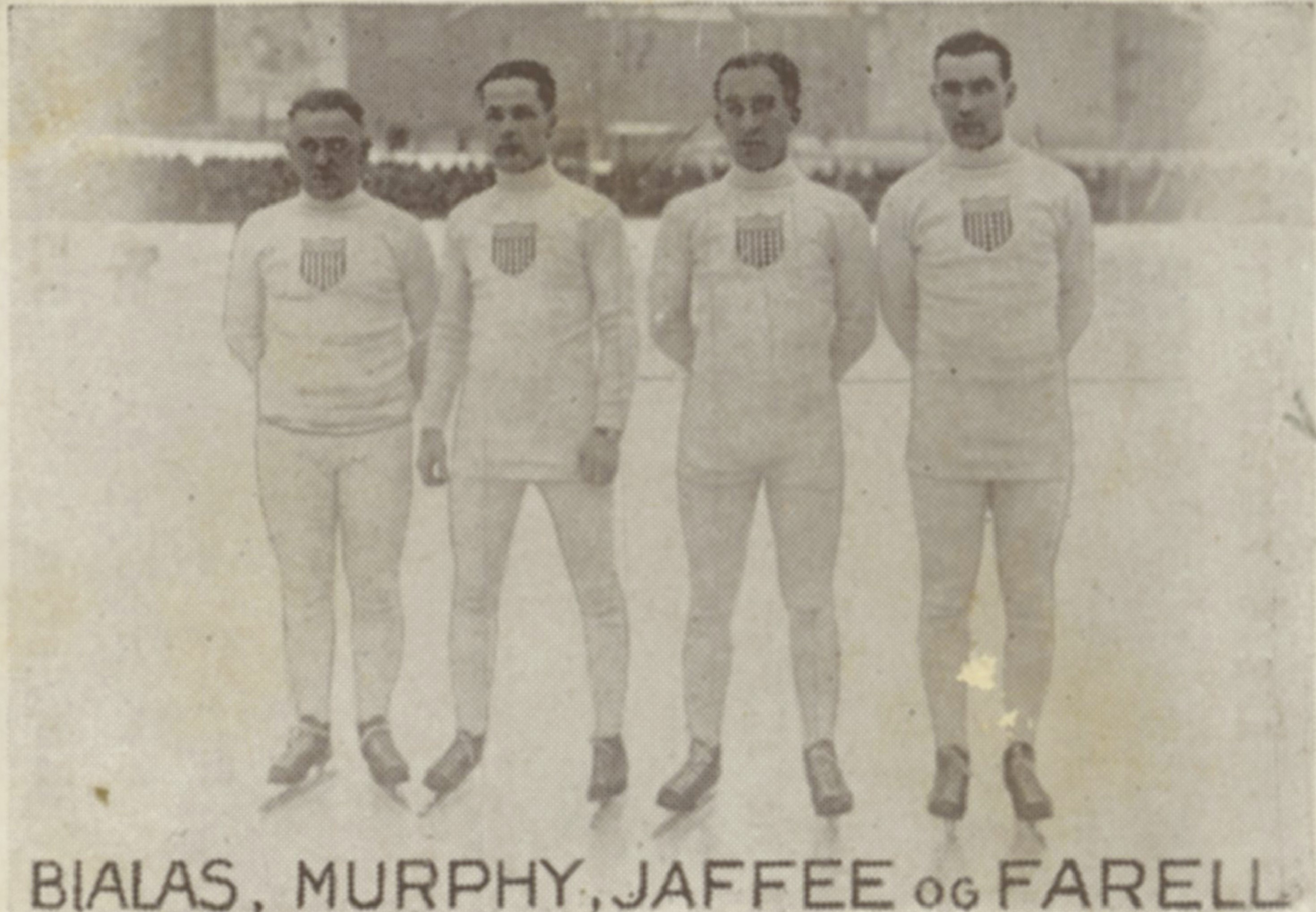 Format: Samlekort Dato / Date: ca. 1930 (dokumentet) Fotograf / Photographer: Ukjent Wikipedia: Valentine Bialas (1903 - 1965) Wikipedia: Eddie Murphy (speed skater) (1905 - 1973) Wikipedia: Irving Jaffee (1906 - 1981) Wikipedia: John Farrell (speed skater) (1906 - 1994) Eier / Owner Institution: Trondheim byarkiv, The Municipal Archives of Trondheim Arkivreferanse / Archive reference: Sportsklubben Freidig: Sigarettfoto ca. 1930 (Løpenr. 75) F23898 Tekst på baksiden: De 4 amerikanske skøiteløpere som besøkte Oslo vinteren 1928 og derefter deltok i olympiaden. Fra venstre: Valentin Bialas, Eddie Murphy, Irving Jaffee og O'Neil Farell. De viste alle en forbausende god skøiteteknikk og kondisjon. Merknad: Disse samlekortene med bilder av norske og internasjonale idretthelter fulgte med i sigarettpakker på 1920 og 30-tallet - derav tobakksreklamen på baksiden. Samlekortene kommer fra Sportsklubben Freidigs arkiv, og inneholder nærmere 90 unike kort pent plassert i et samlealbum. Samleren var den senere skipsmegler Finn Følling (1914 – 1985).